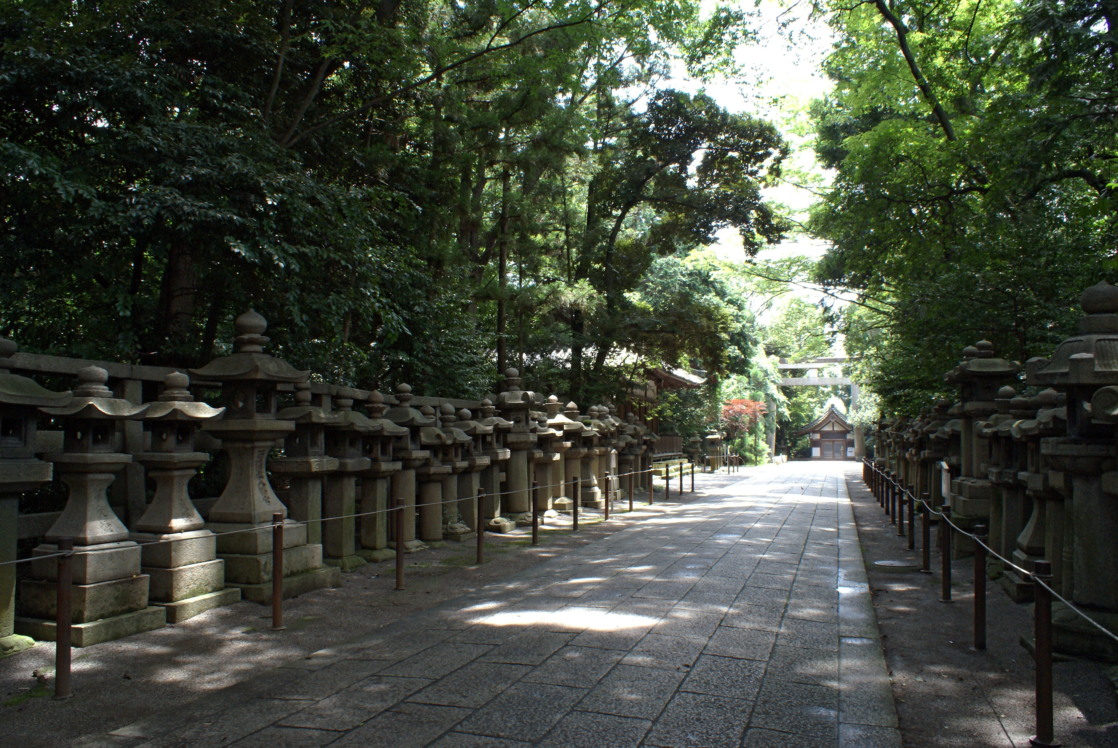 Iwashimizu Hachimangu in Yawata, Kyoto, Japan